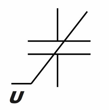 Условное графическое изображение вариконда